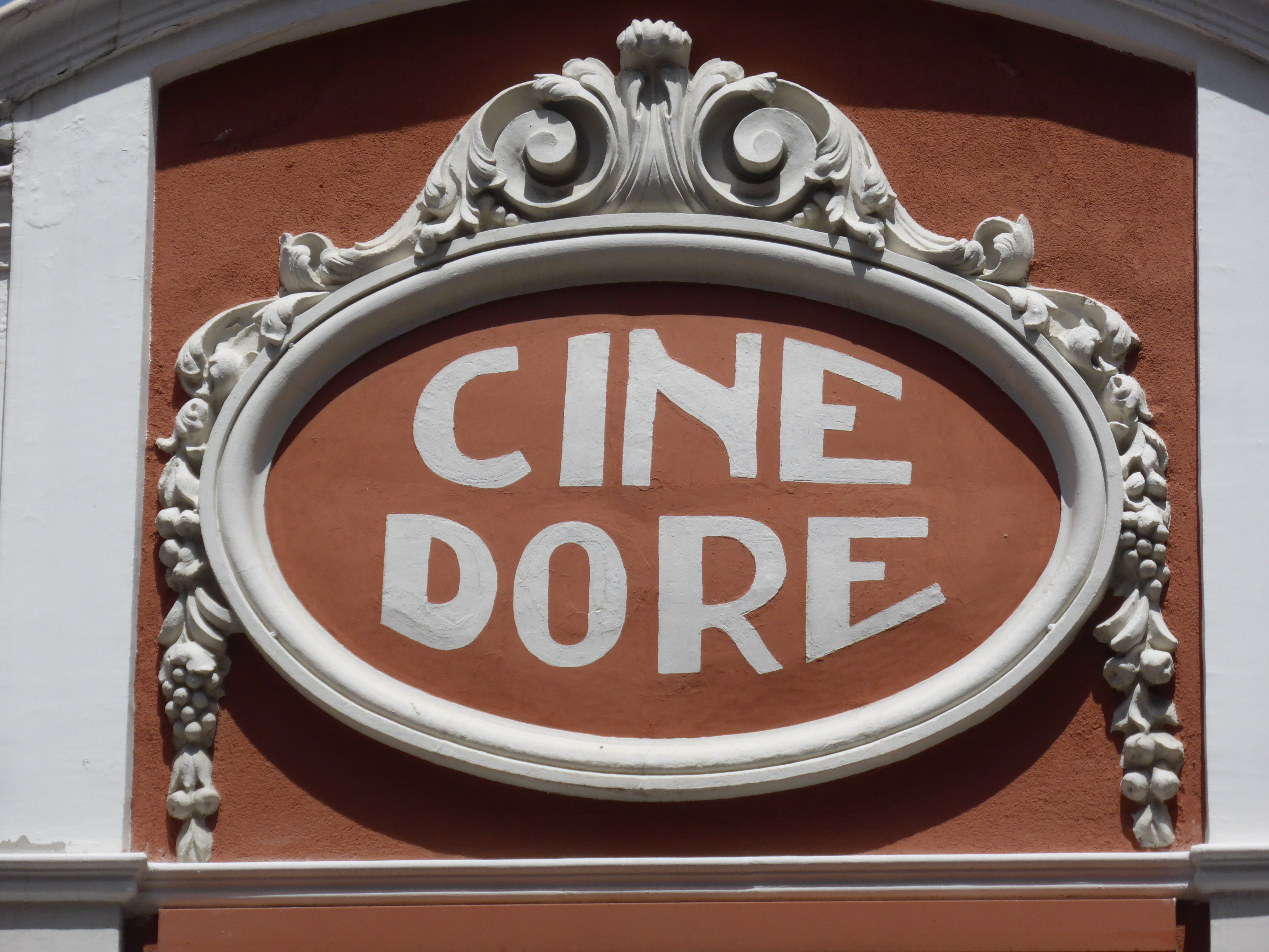 En la calle Santa Isabel, número 3 , de Madrid (España), se encuentra la sala de proyecciones de la Filmoteca Española. La fachada es del año 1923. En el detalle se lee el nombre: CINE DORE.